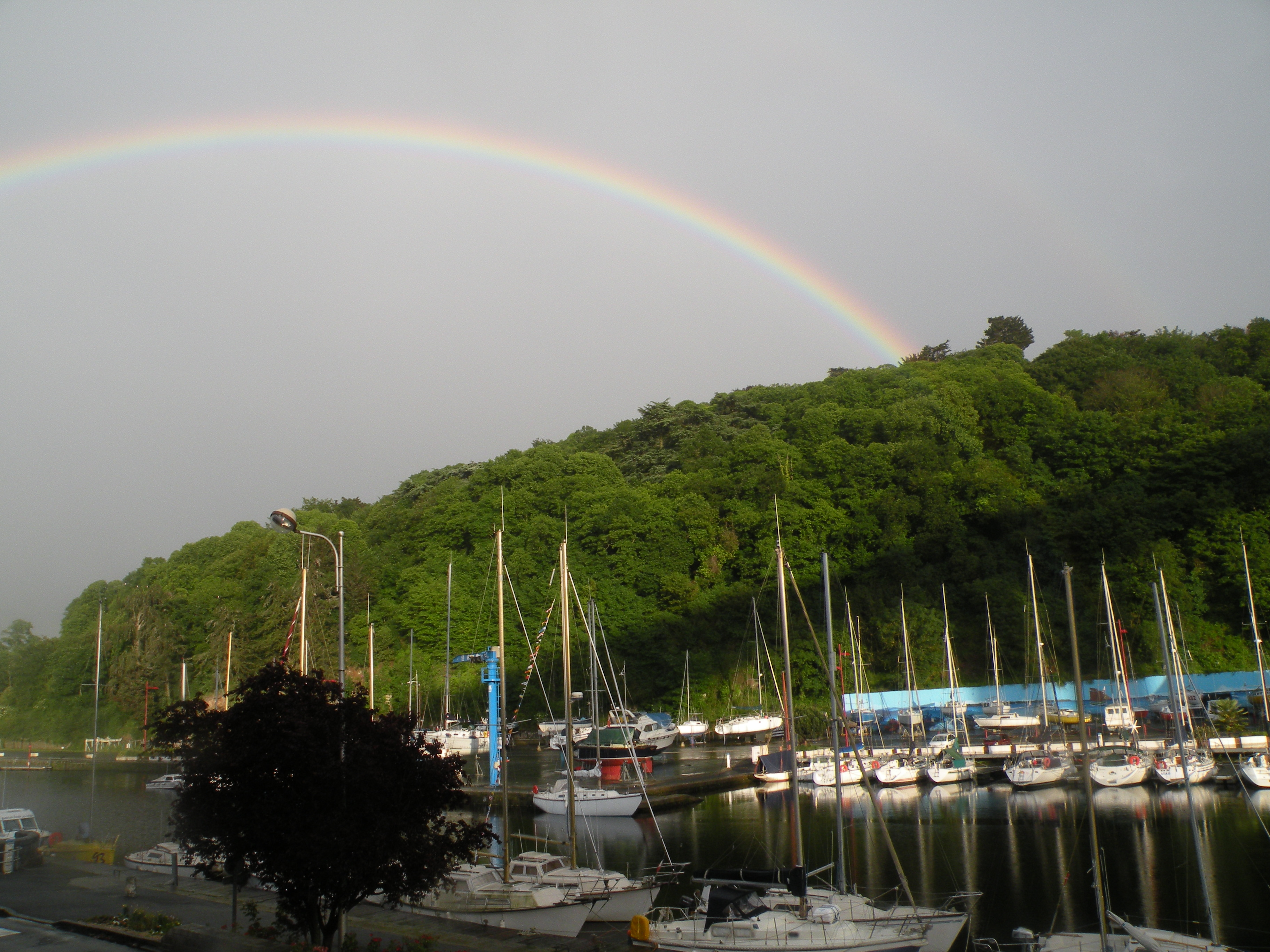 Le port du Légué entre Plérin et Saint-Brieuc.